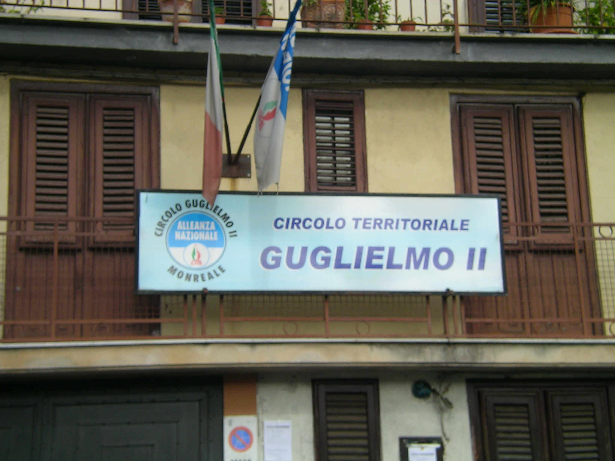 Monreale, Piazza Guglielmo II